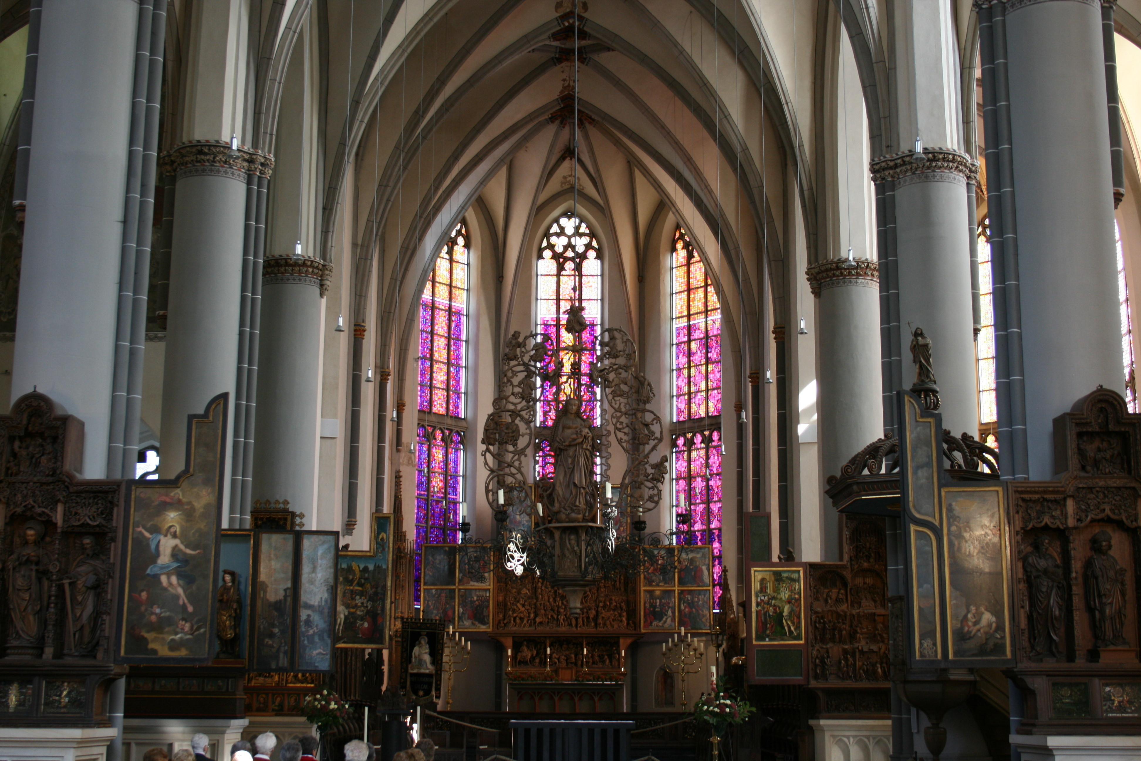 Sankt Nicolai in Kalkar